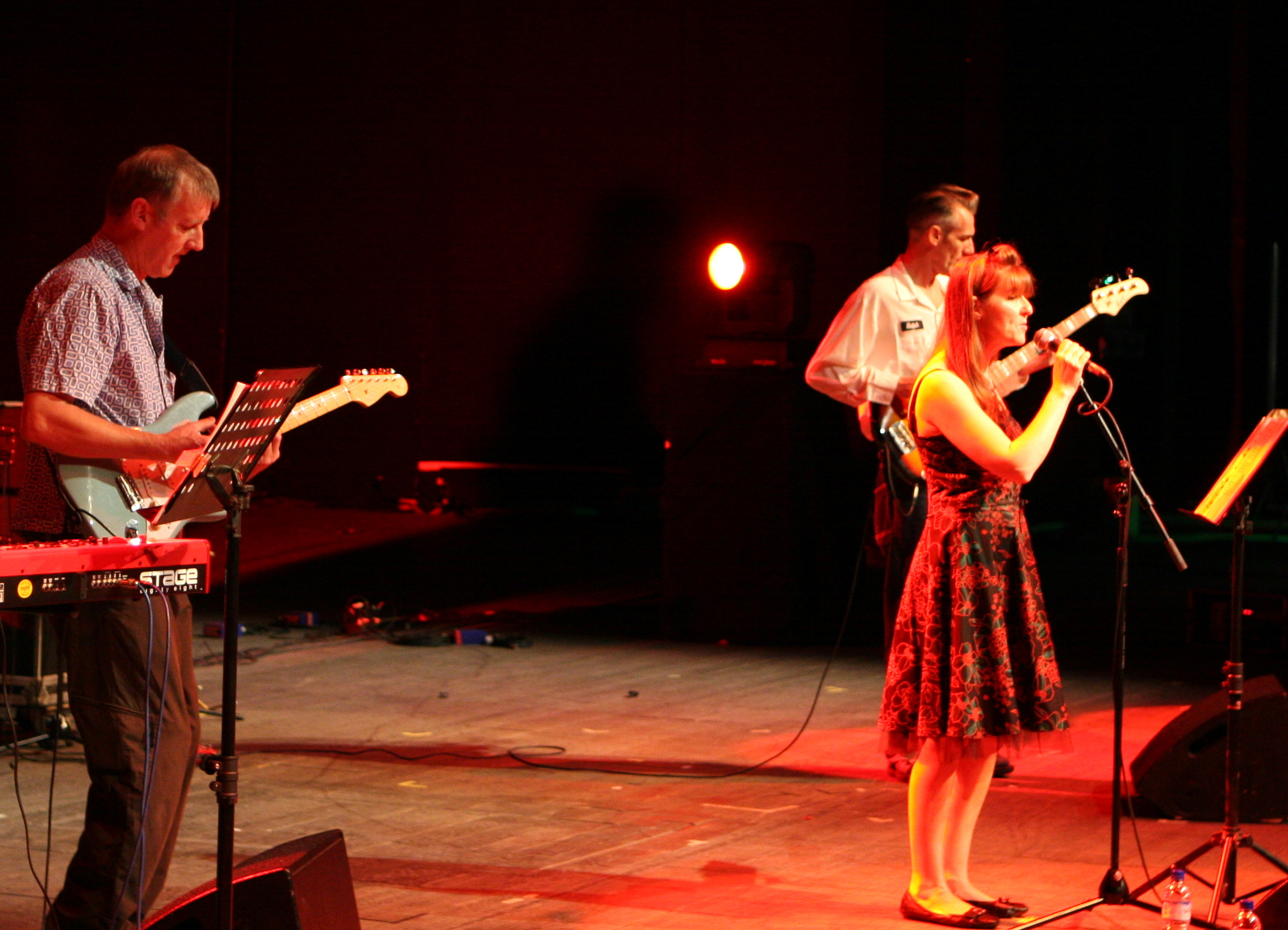 Young Marble Giants, Primavera Sound 2008